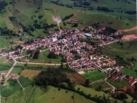 Vista Aérea de Córrego do Bom Jesus